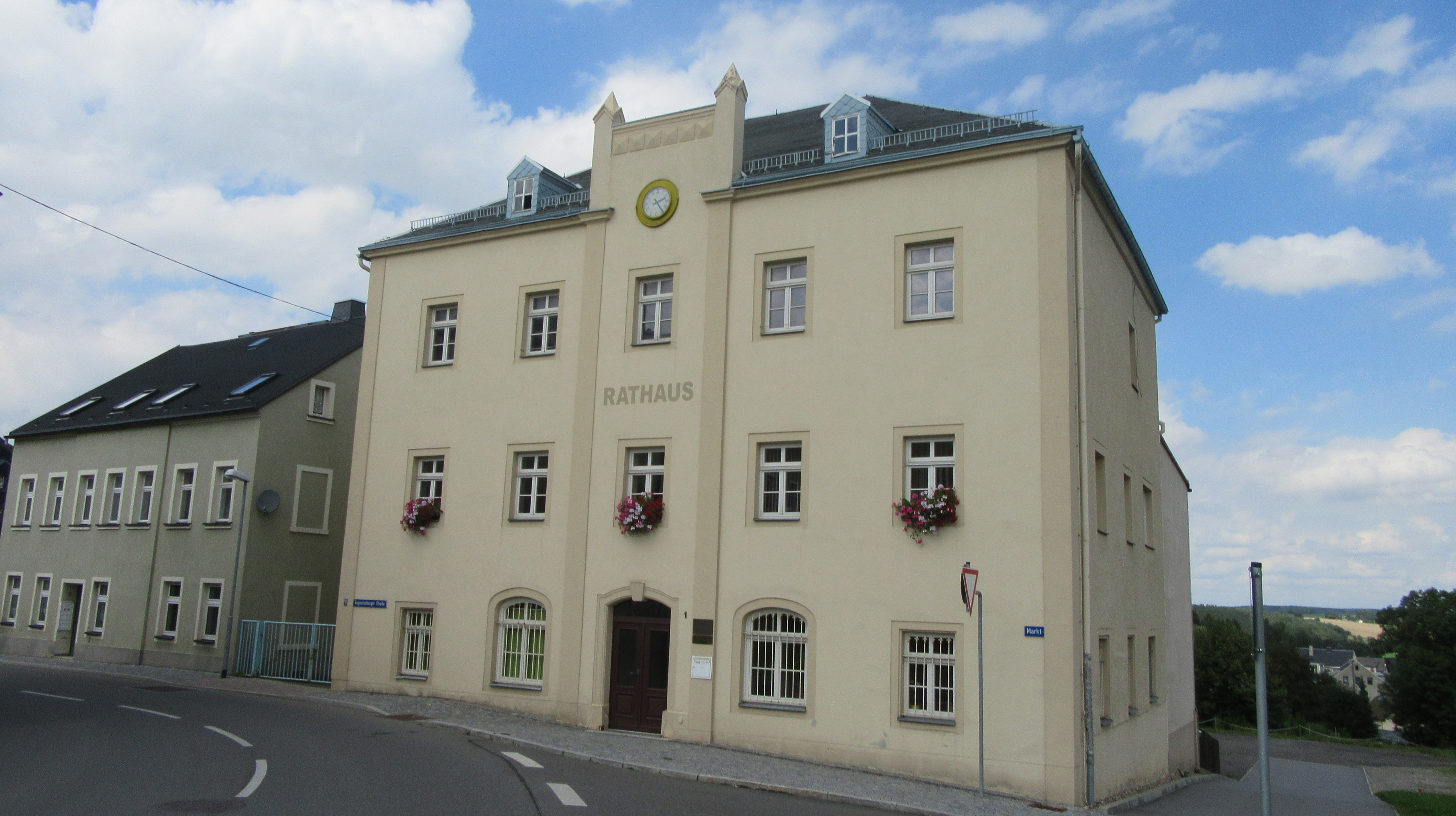 Rathaus Lengefeld nach Abriss des rechten Nachbargebäudes